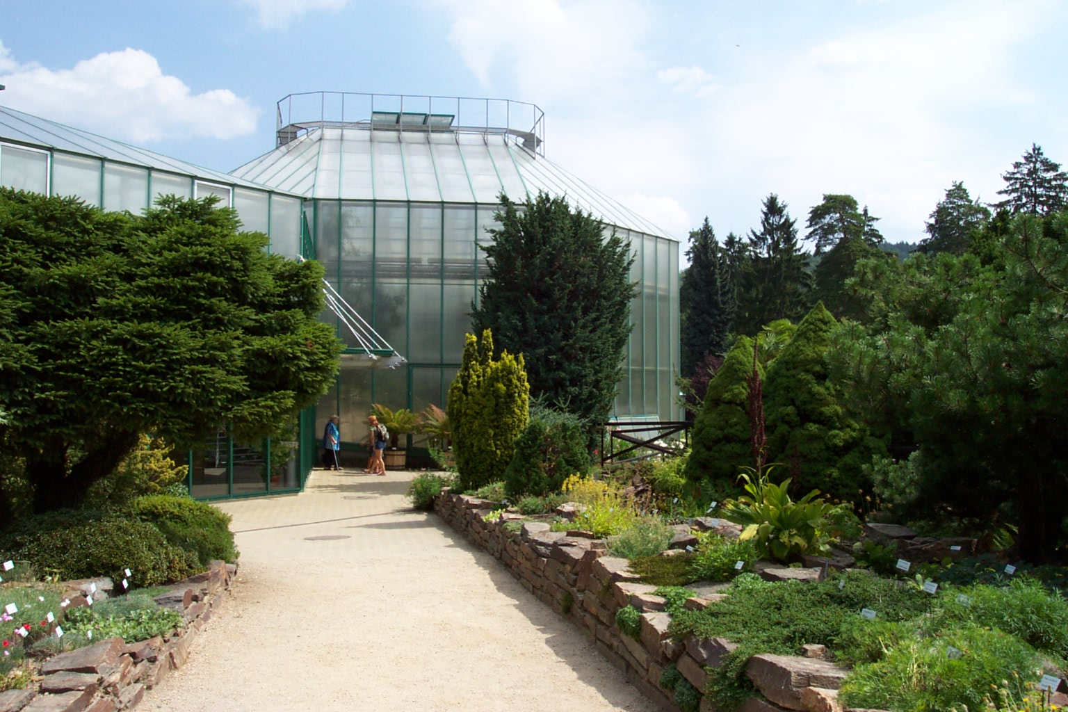 Botanic garden in Liberec, CZ - Botanická zahrada v Liberci, Česká republika